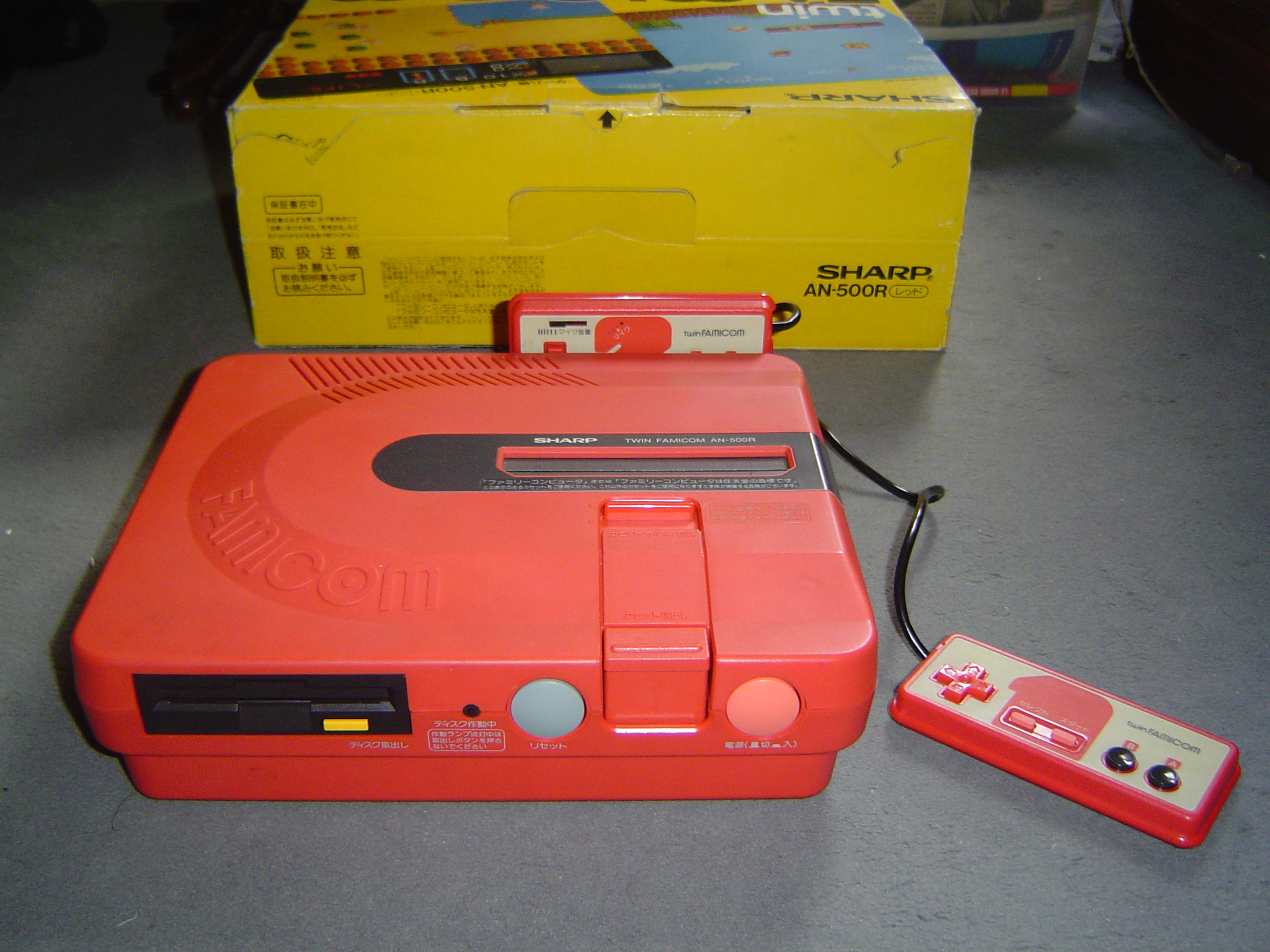 Sharp Twin Famicom AN-500R